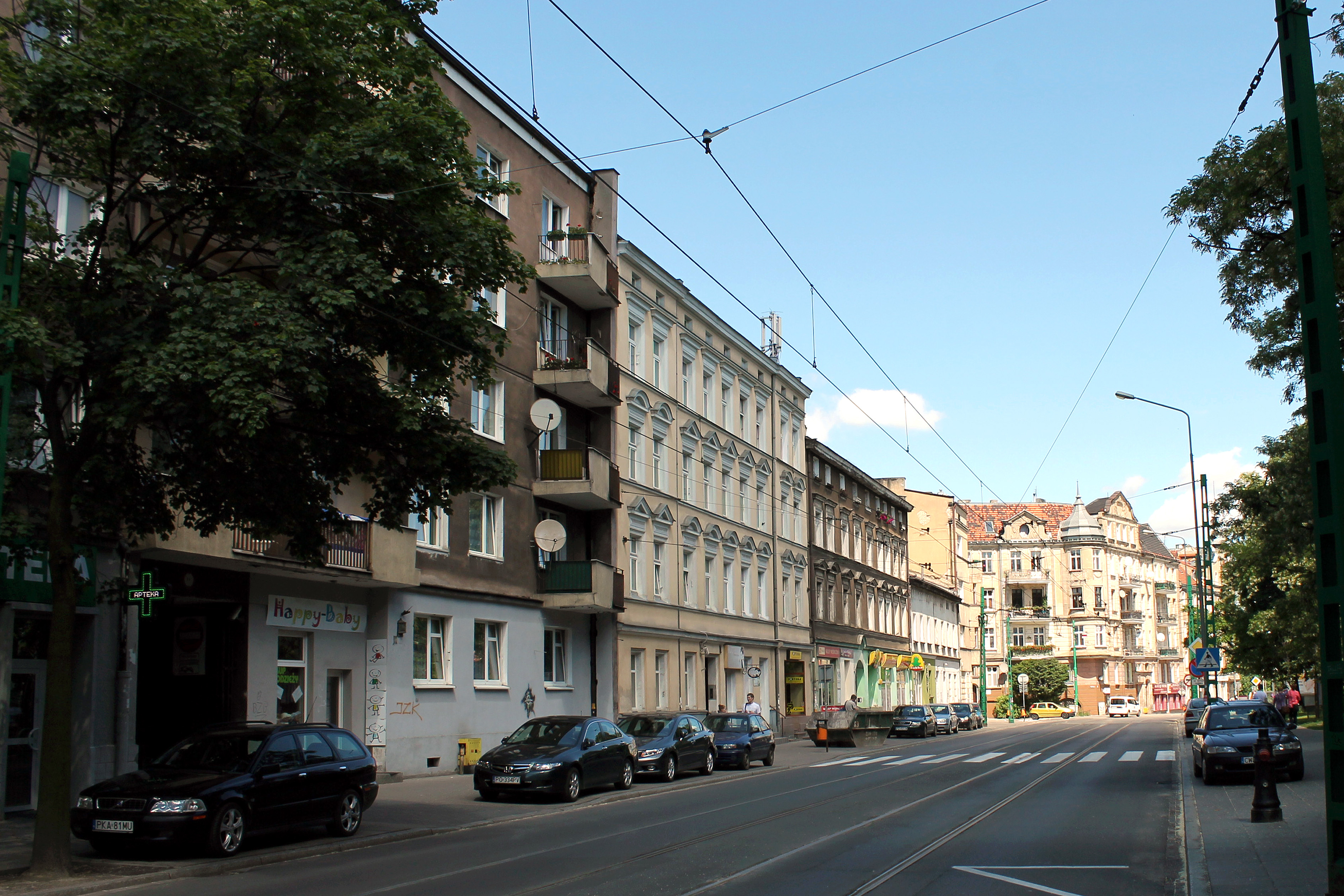 Ulica 28 Czerwca 1956, fotografia z przystanku tramwajowego "Kosińskiego".